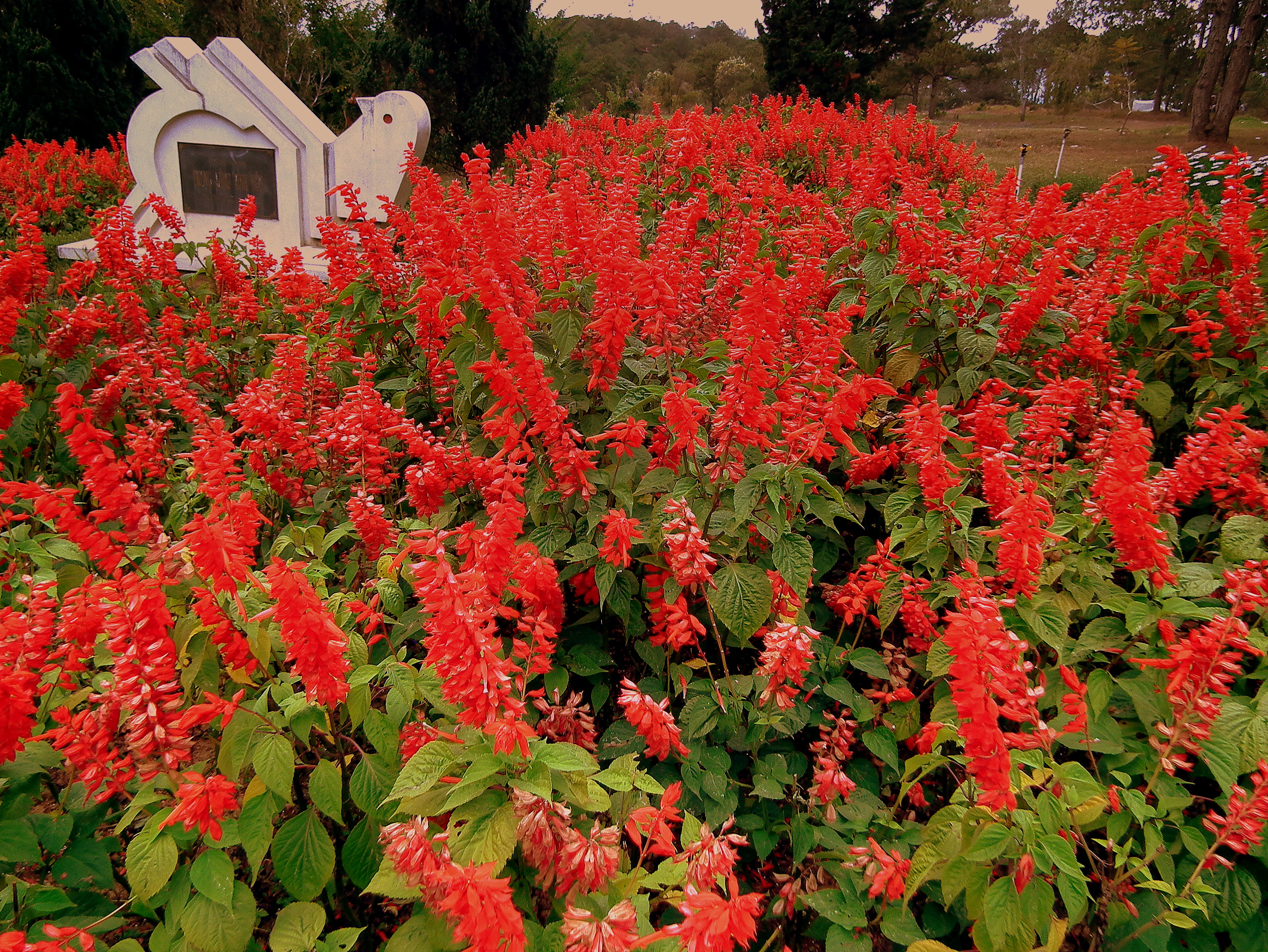 DA LAT VALLEY OF LOVE VIETNAM JAN 2012